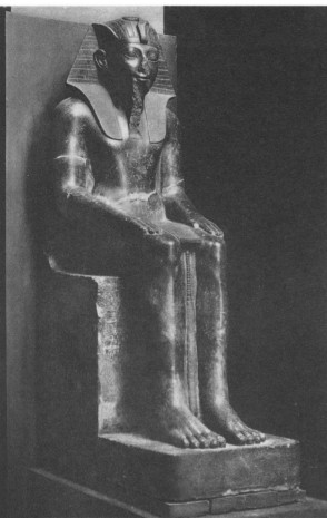 Statue des Thutmosis III. Schwarzer Granit Höhe: 1,89 m gefunden 1859 in Karnak von Auguste Mariette heute im Ägyptischen Museum Kairo, CG 578